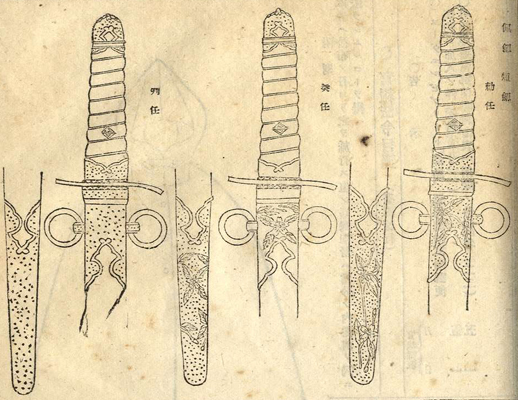 臺灣總督府文官短劍。Gazette Page 35 on No.3231 in 1911.